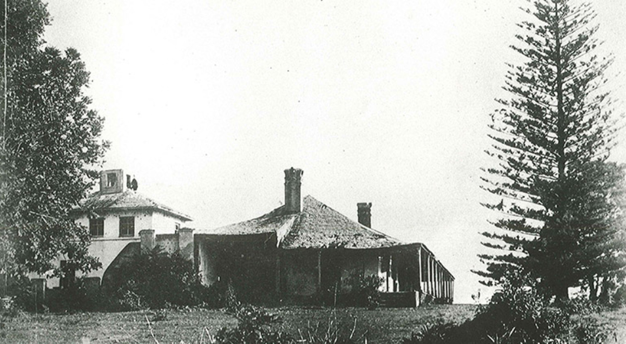 Lake Innes House, Port Macquarie, circa 1870